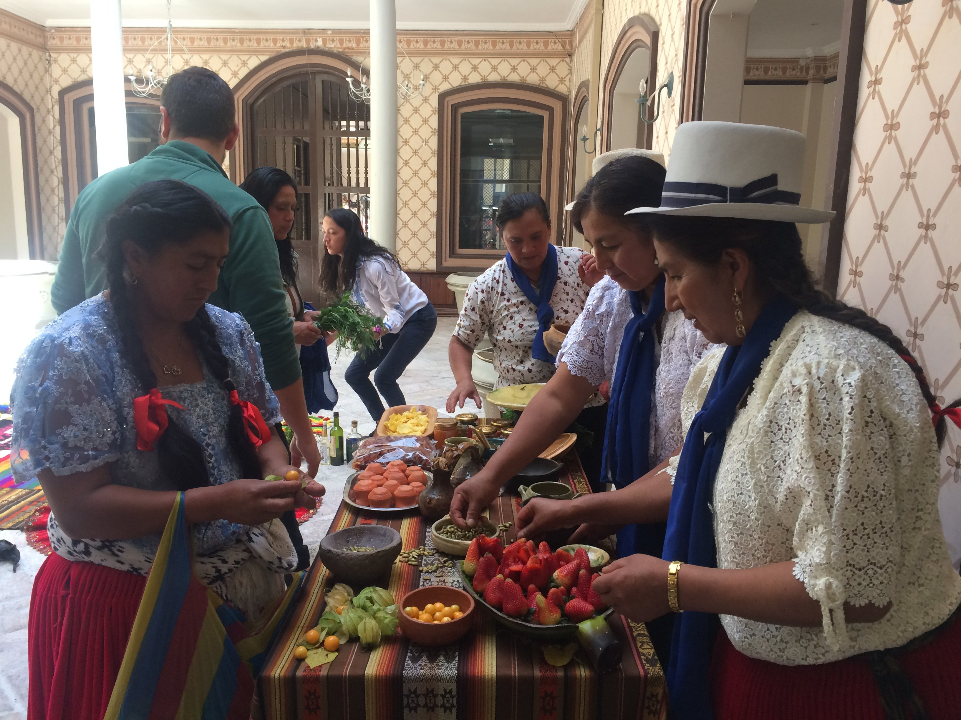 Exposición de Comida Típica en Sayausí